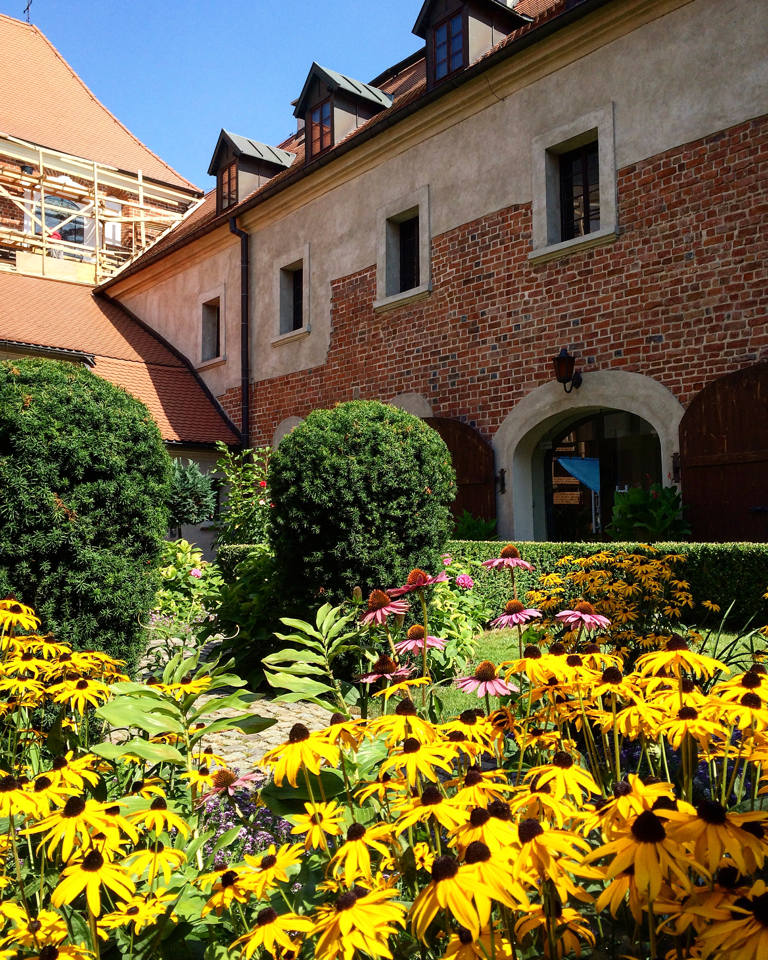 Mogilno, zespół klasztorny benedyktynów